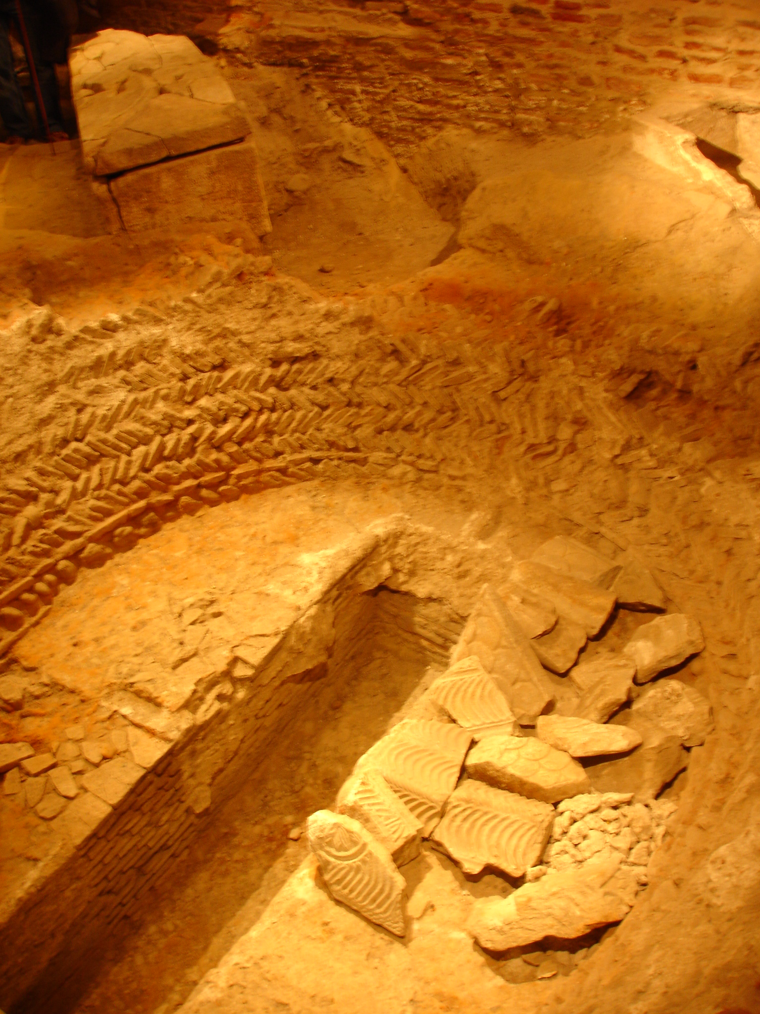 Toulouse (Haute-Garonne, France) : Musée Saint-Raymond, four à chaux découvert dans le sous-sol du musée. Il servait au recyclage des tombes en calcaire de la nécropole environnante. On voit des fragments de stèles sur la droite.